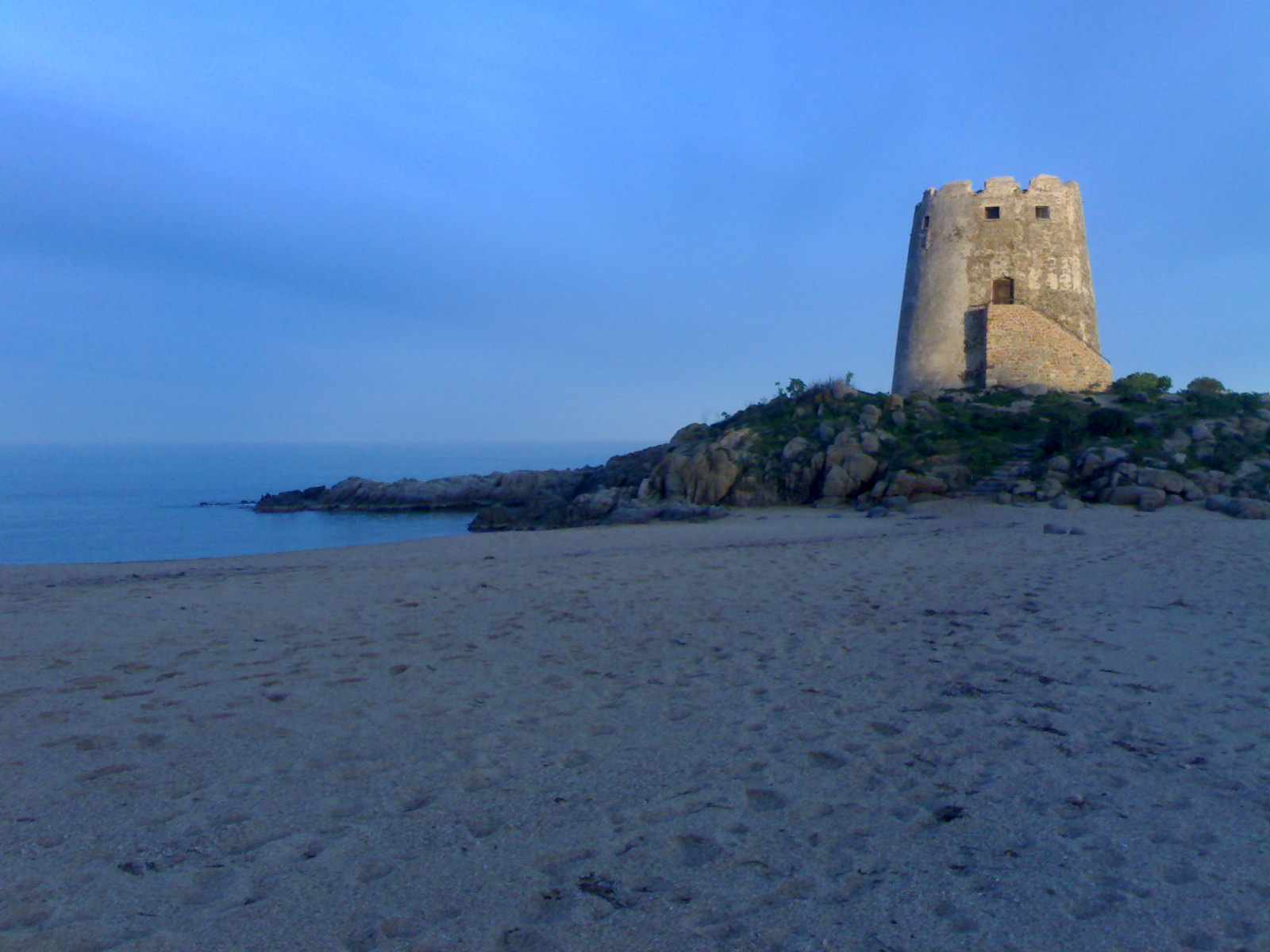 Torre di Barì bei Bari Sardo, Ostküste, Sardinien